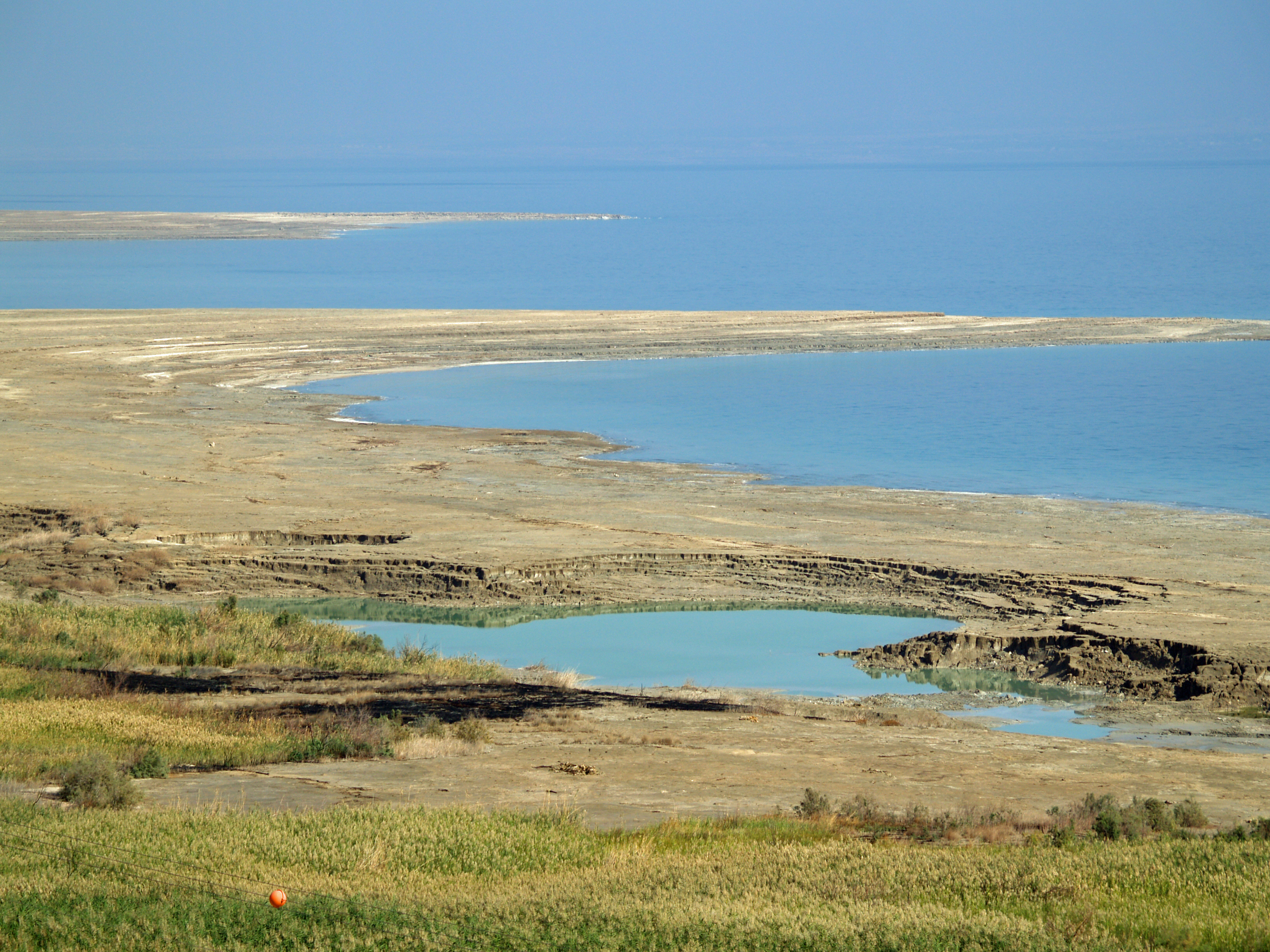 Dead Sea sinkhole